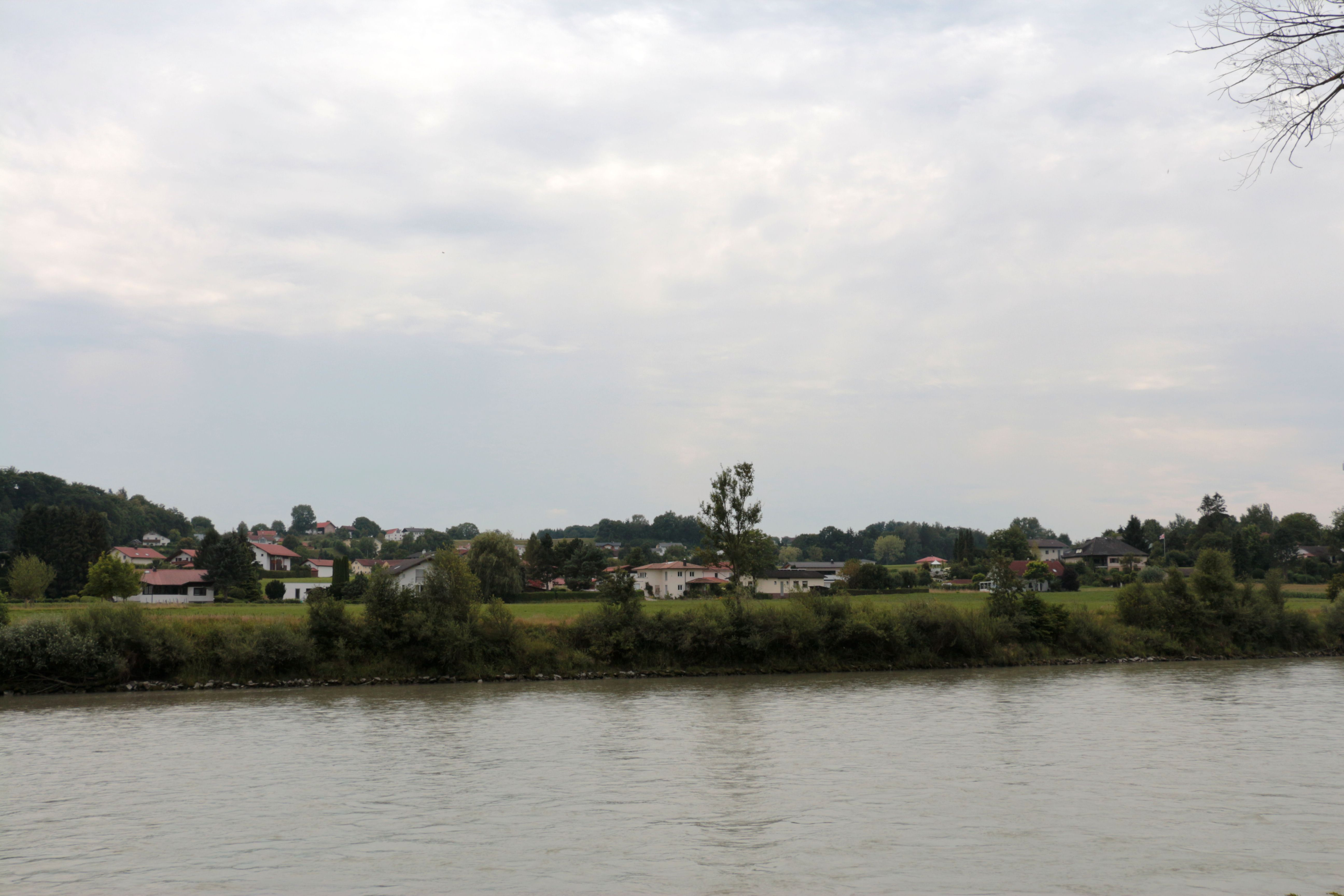 Wanghausen (Gmd. Hochburg-Ach, Oberösterreich) von Burghausen (Landkreis Altötting) aus gesehen